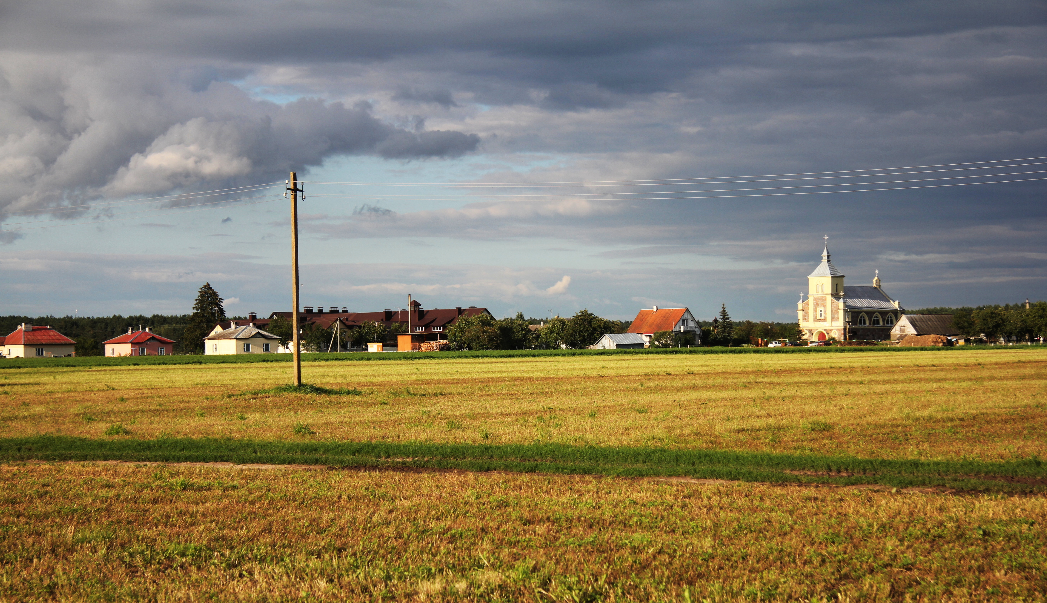 Pielasa, rejon werenowski, Białoruś